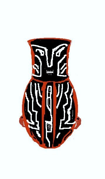 Paint